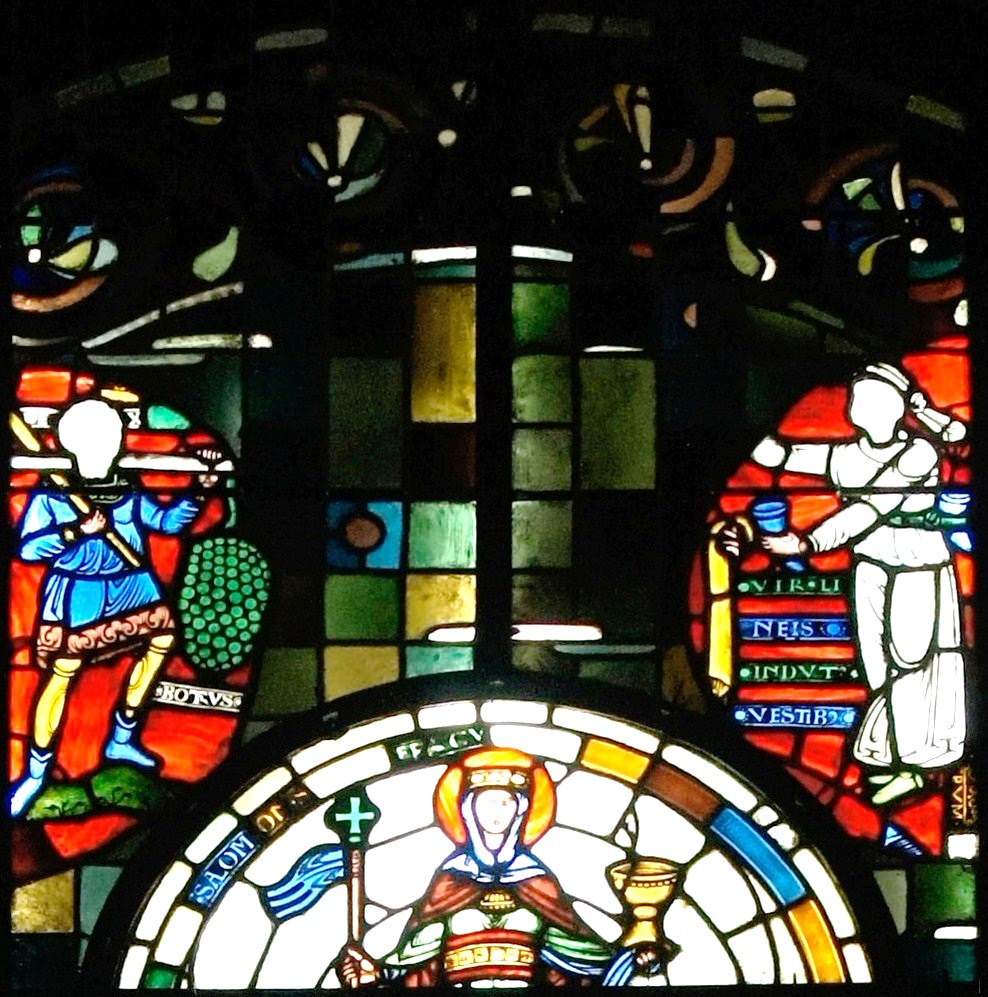 vitrail signifiant L'église dans le vitrail de la rédemption en la Cathédrale Saint-Étienne de Châlons.